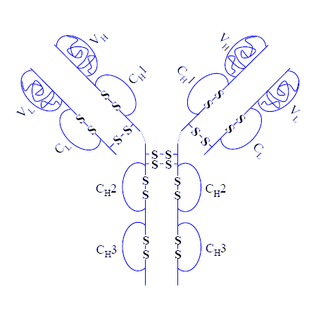 Structure of adalimumab